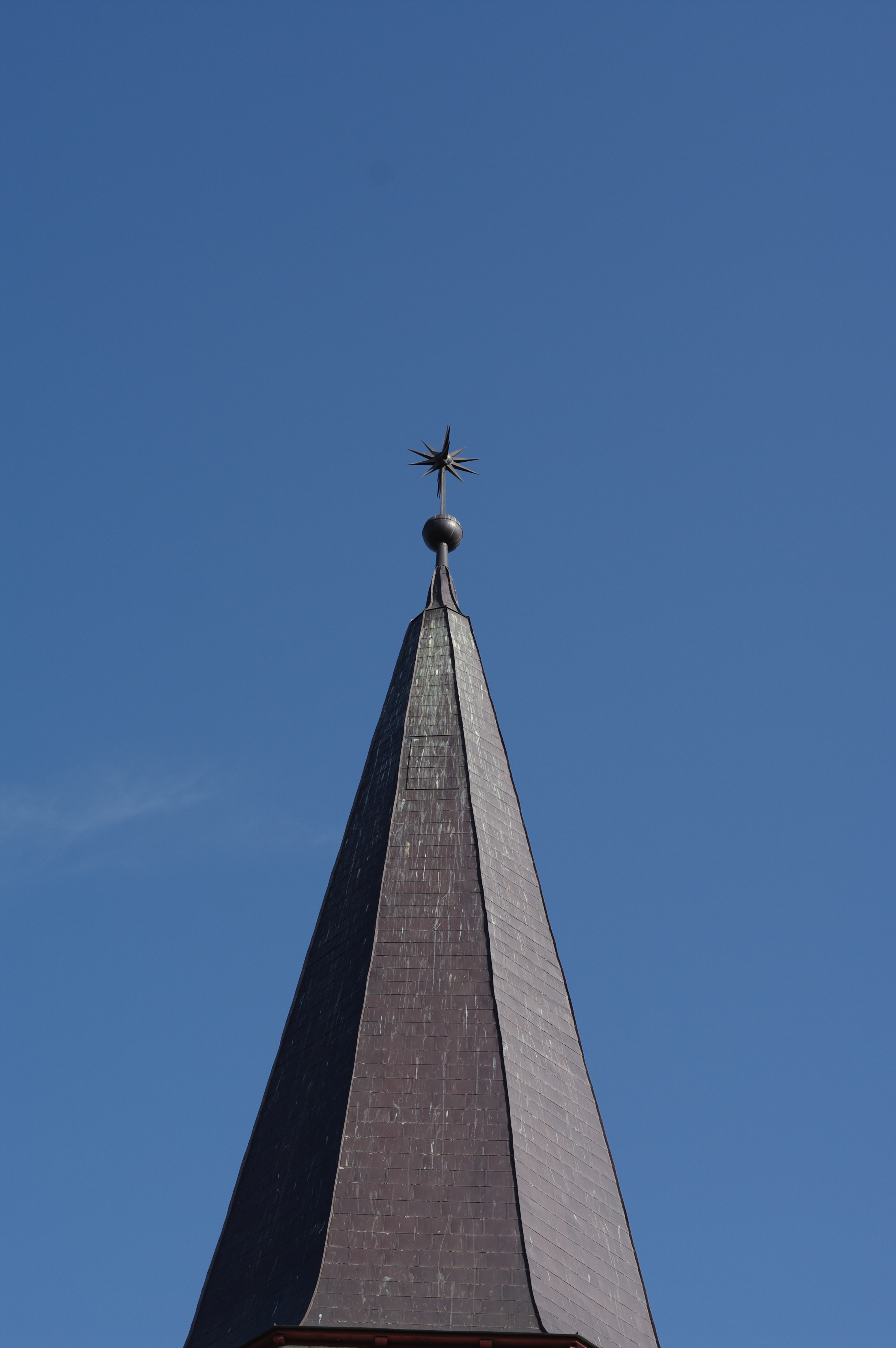 Kanepi kiriku tornikiiver